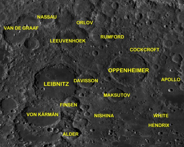 Cráter lunar Davisson. Localización. (LRO)